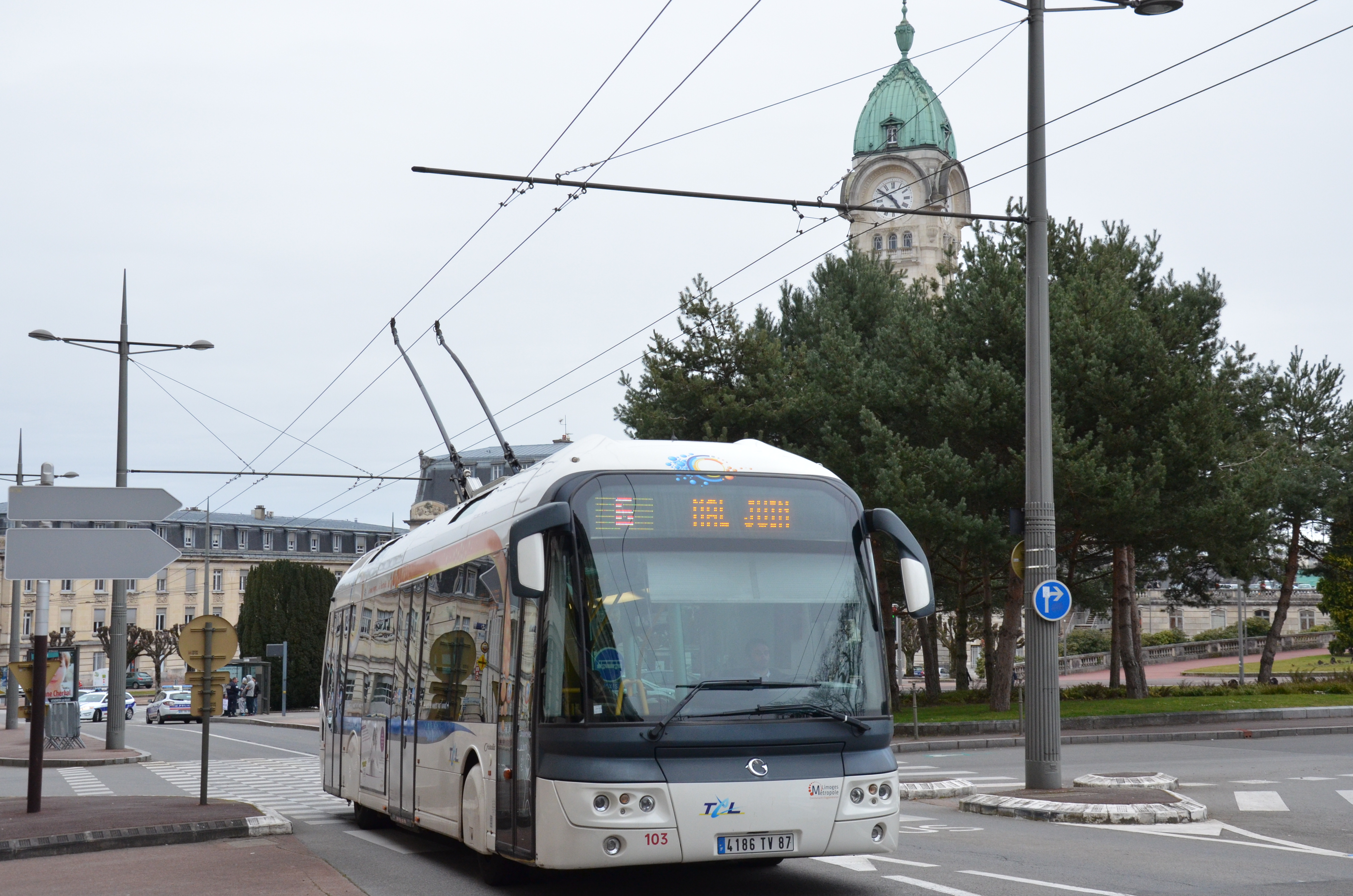 Irisbus Cristalis ETB12 n°103 de la ligne 6 du réseau TCL, à la Gare des Bénédictins.